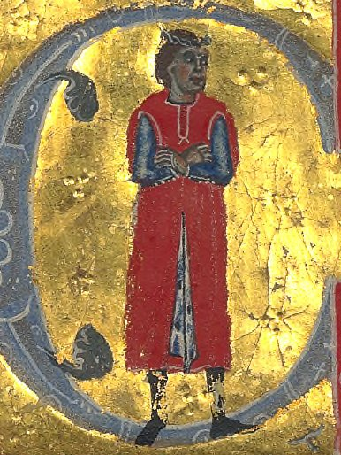 Marcabru / Marcabrun